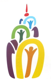 Логотип Харькова к Евро 2012